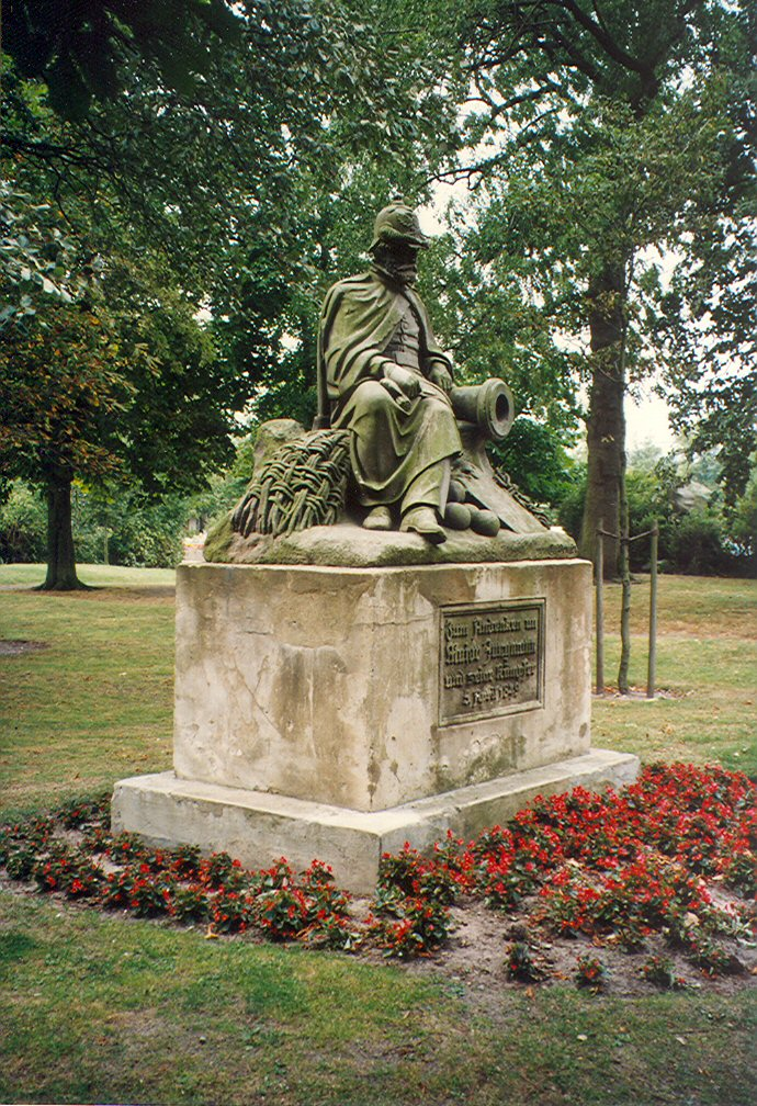 Major Jungmann-Sitzbild in Eckernförde